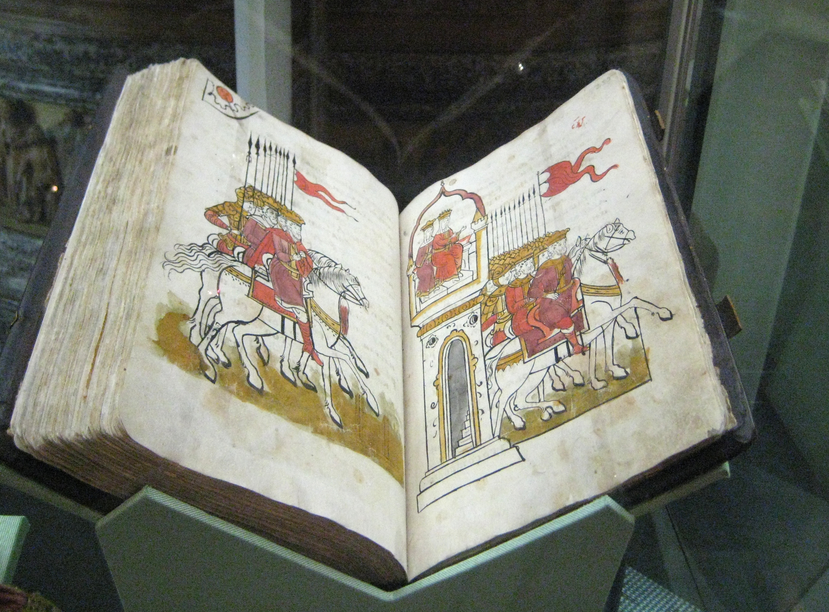 Сказание о Мамаевом побоище. Конец 17 века. ГИМ.